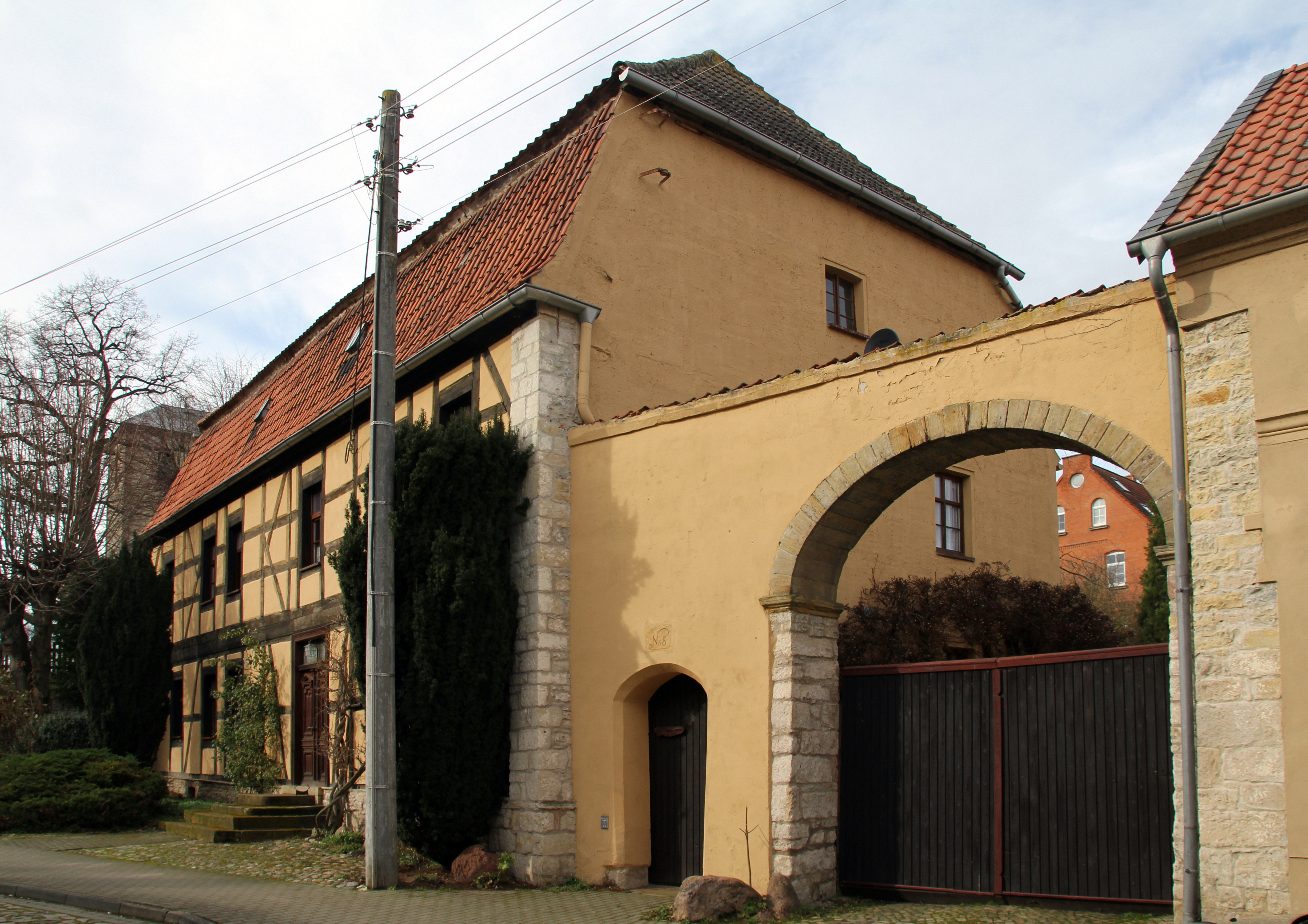 Bauernhof Friedensstraße 8 Domersleben